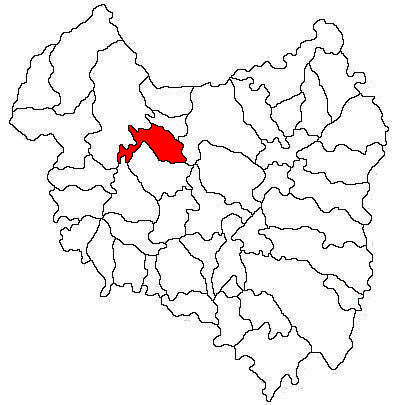 Categorie:Hărţi ale judeţului Covasna